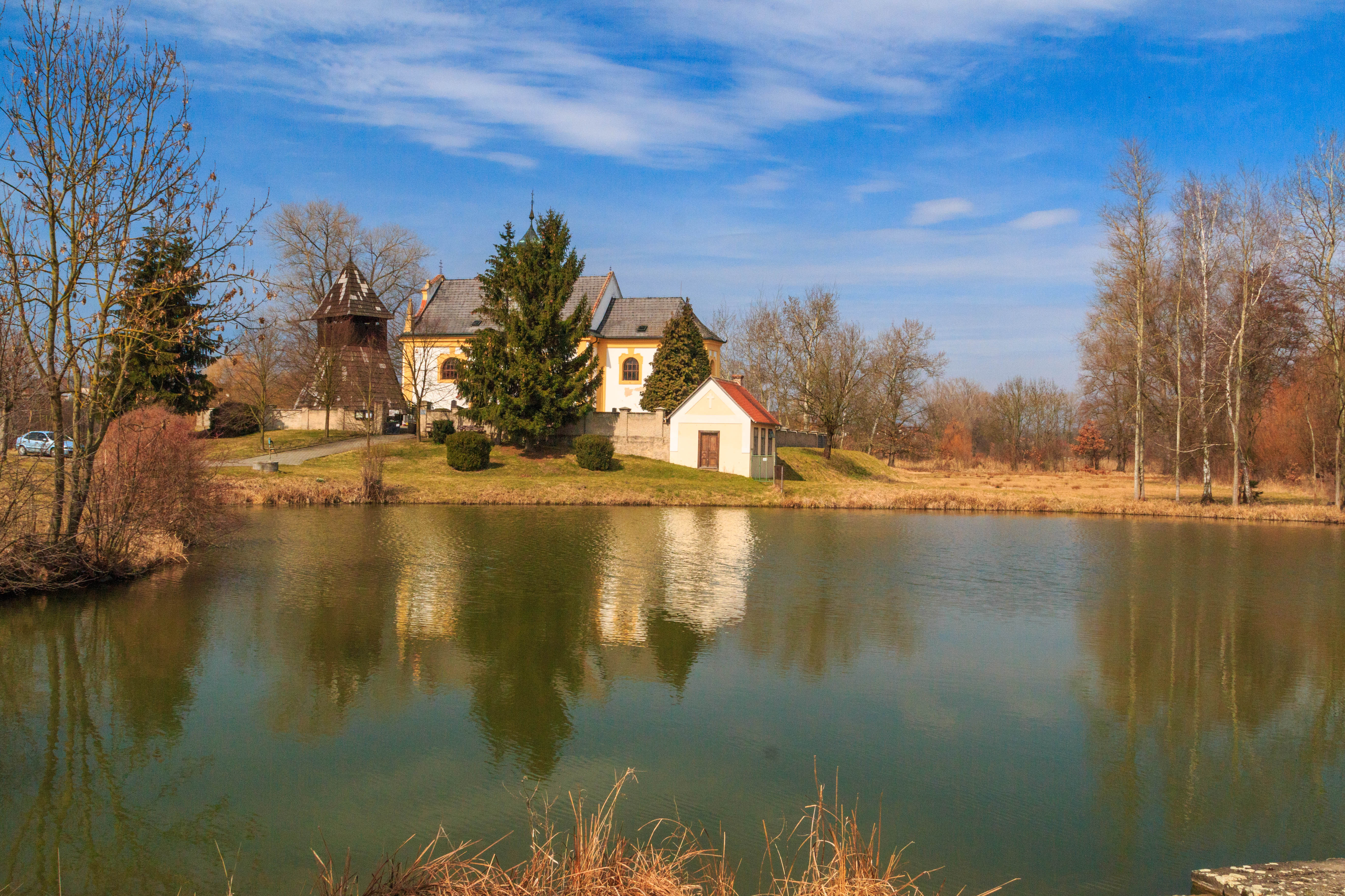 Lučický rybník Project: Vodstvo.